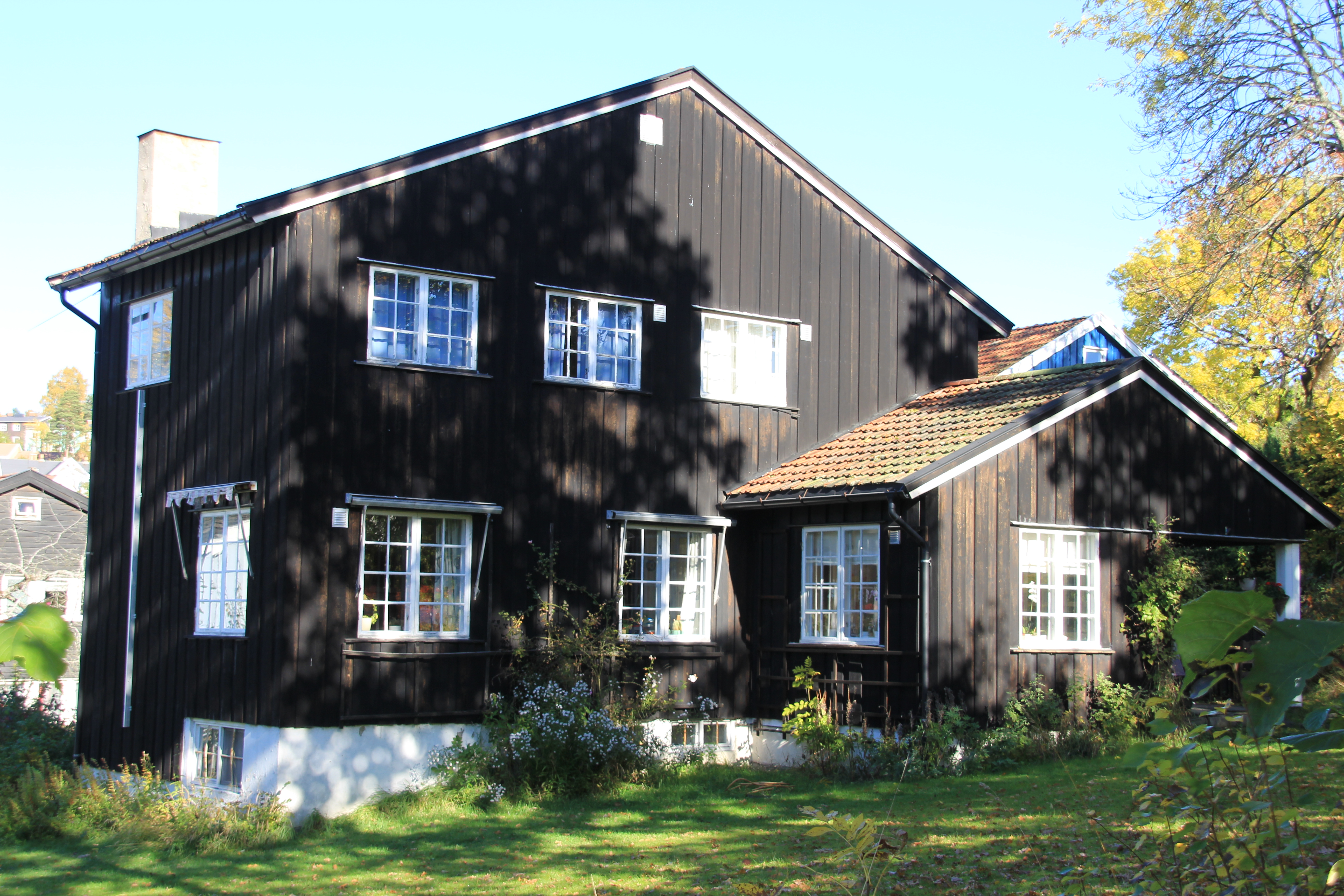 Nils Bays vei 12. Arkitekt Anton Poulsson. Sundts premie 1950.